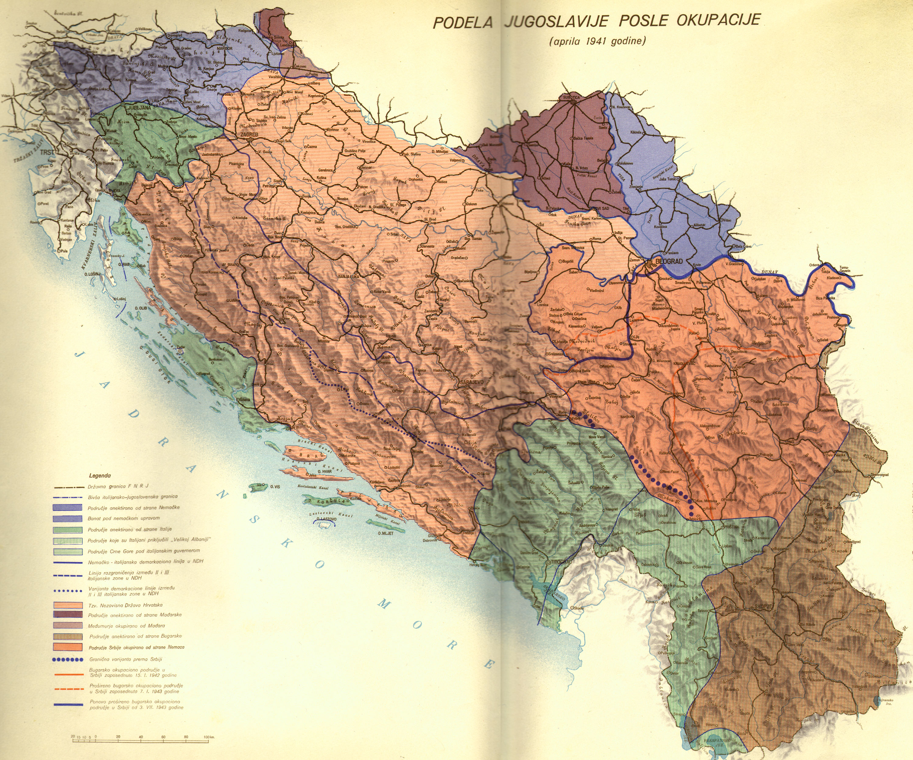 Srpskohrvatski / српскохрватски: Okupirana Jugoslavija u drugom svetskom ratu.